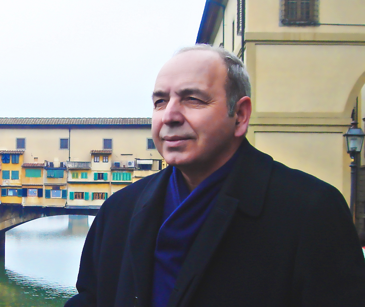 Фотопортрет профессора Фикрета Гусенова